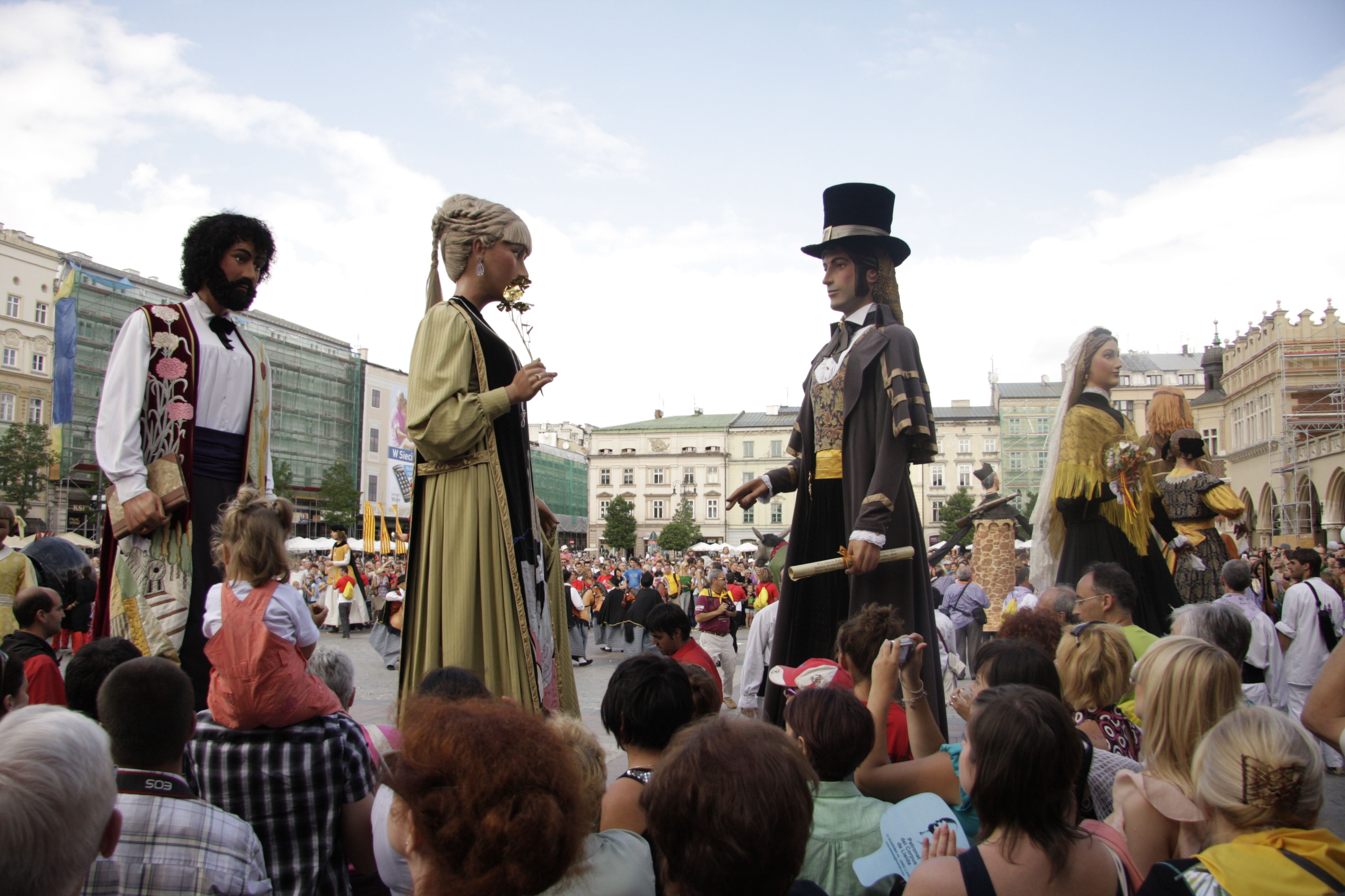 L'Aplec Internacional celebrat a la ciutat polonesa de Cracòvia l'agost del 2010. Gegants de Rubí (a la dreta) i gegants de l'Agrupació de colles geganteres de Catalunya (a l'esquerra).